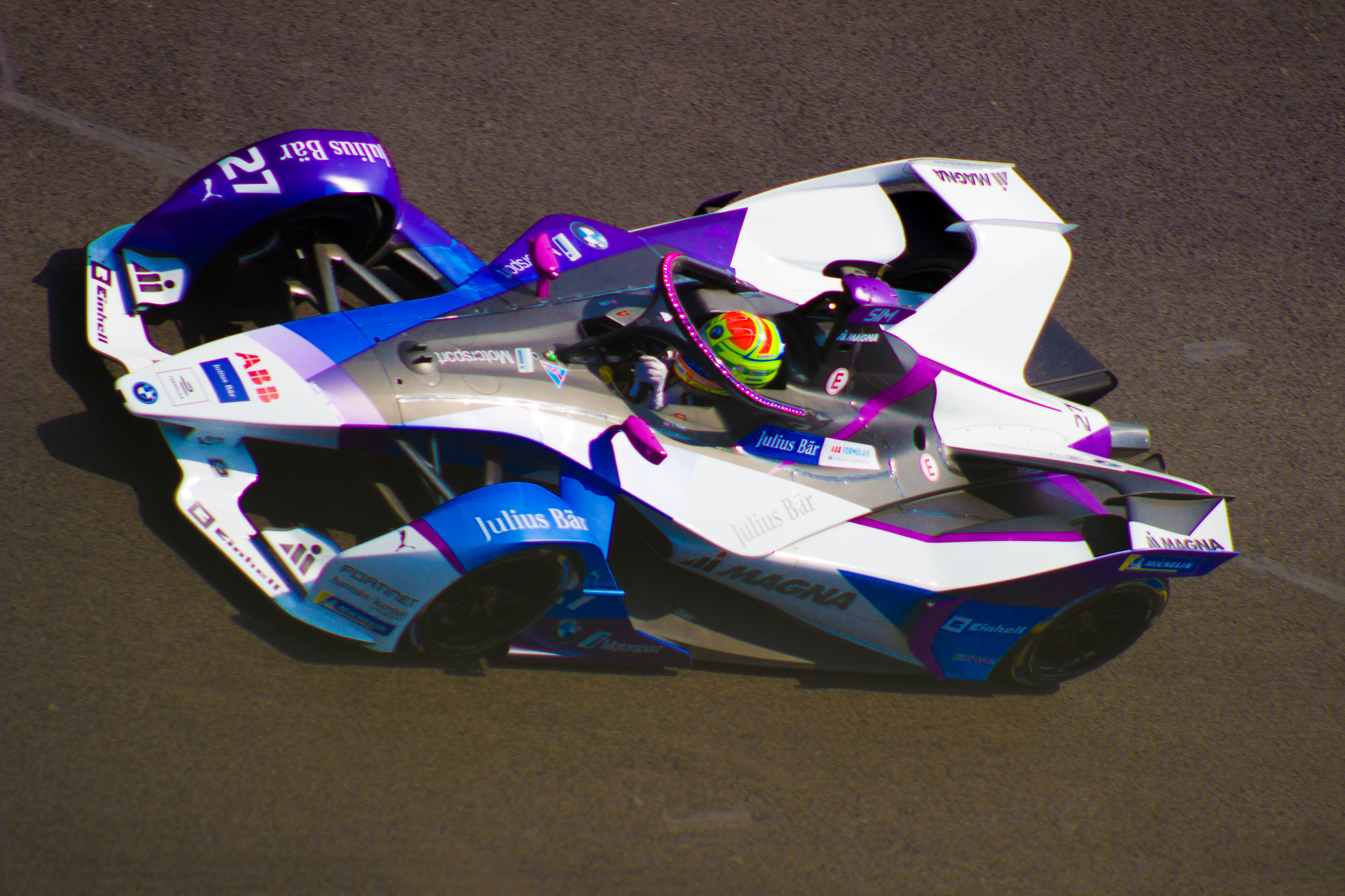 2019-20 FIA Formula E, CBMM Niobium Mexico City E-Prix 2020, Autódromo Hermanos Rodríguez, Ciudad de México, 15 de febrero 2020